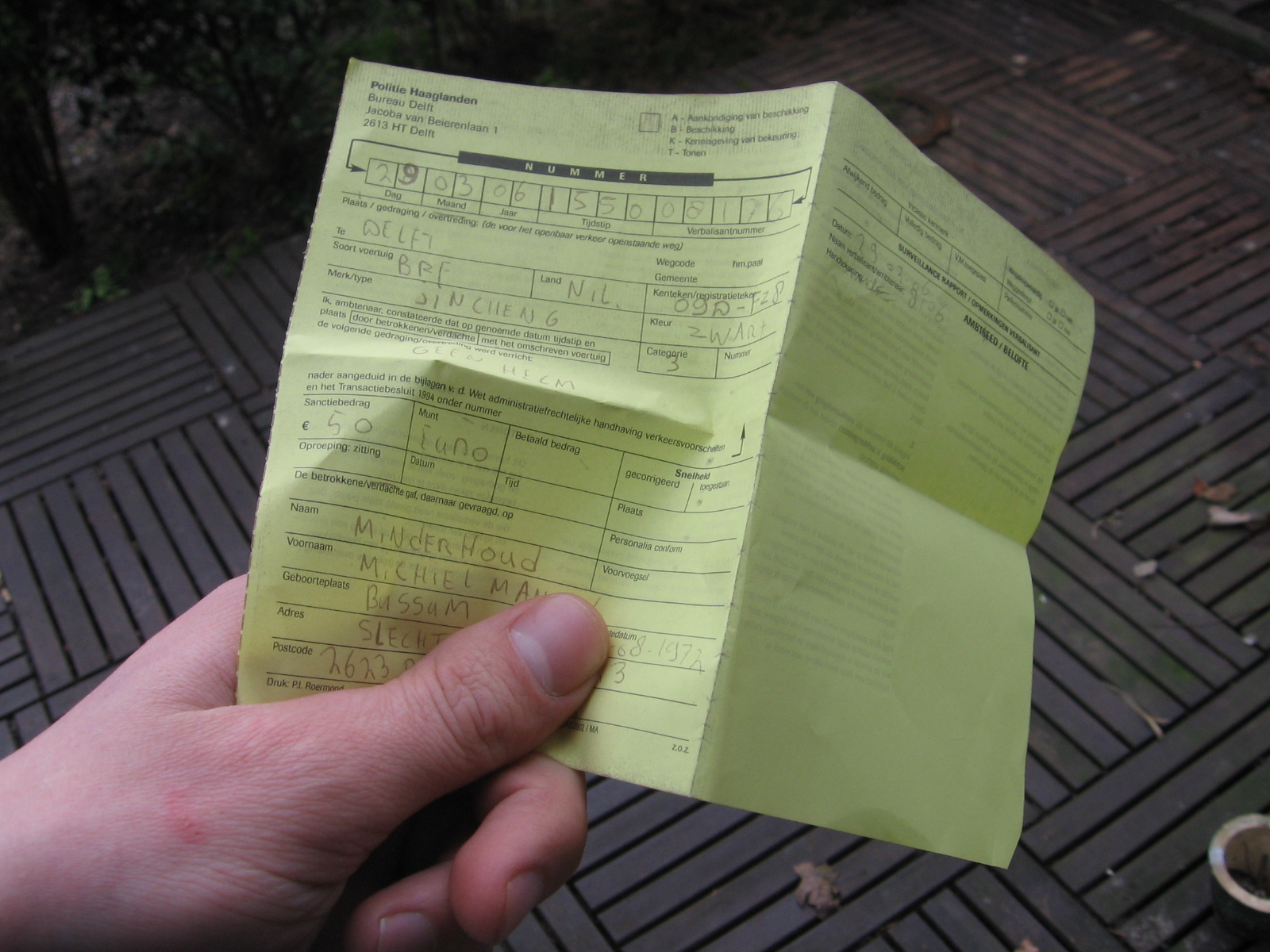 bekeuring (zonder helm rijden..)